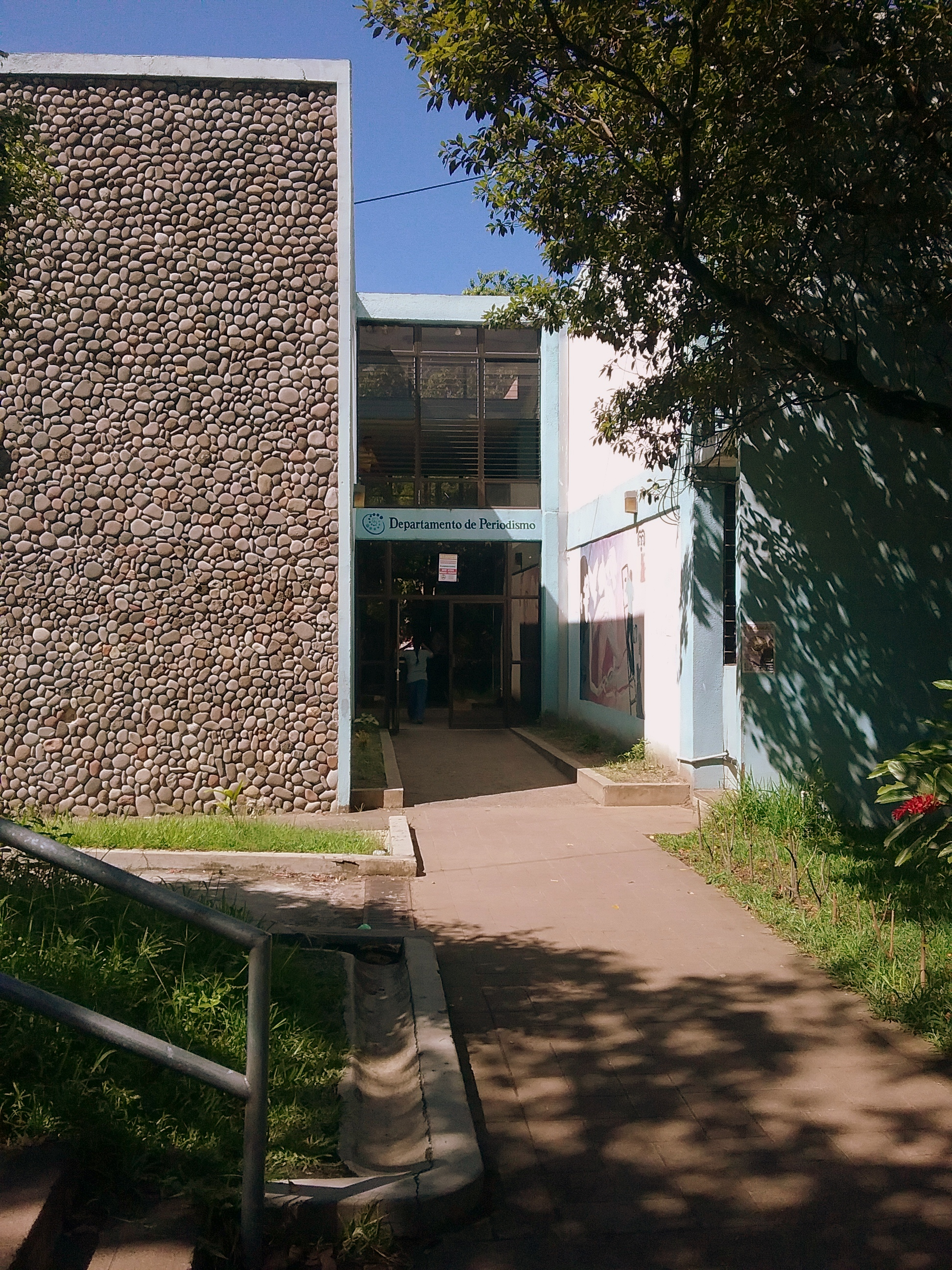 Edificio de la Escuela de Periodismo, Facultad de Ciencias y Humanidades de la Universidad de El Salvador.